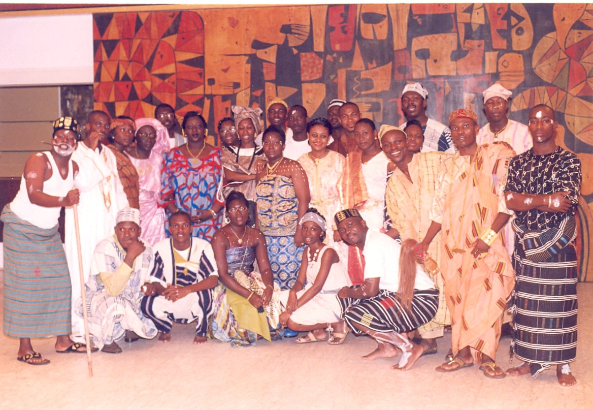 Avant concert du groupe "Les Voix de l'Amour" à Abidjan en Juillet 2002, au PAlais des Congrès de l'Hotel Ivoire.